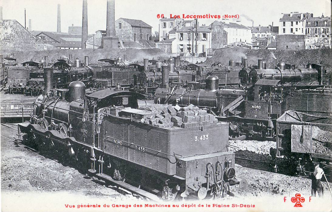 Carte postale ancienne éditée par CCCC - FF N°66 Les locomotives (Nord) : Vue générale du garage des machines au dépot de la Plaine Saint-Denis